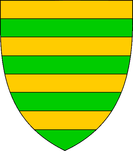 Blasón de la Casa Lauria, ahora también conocida como Lluria.